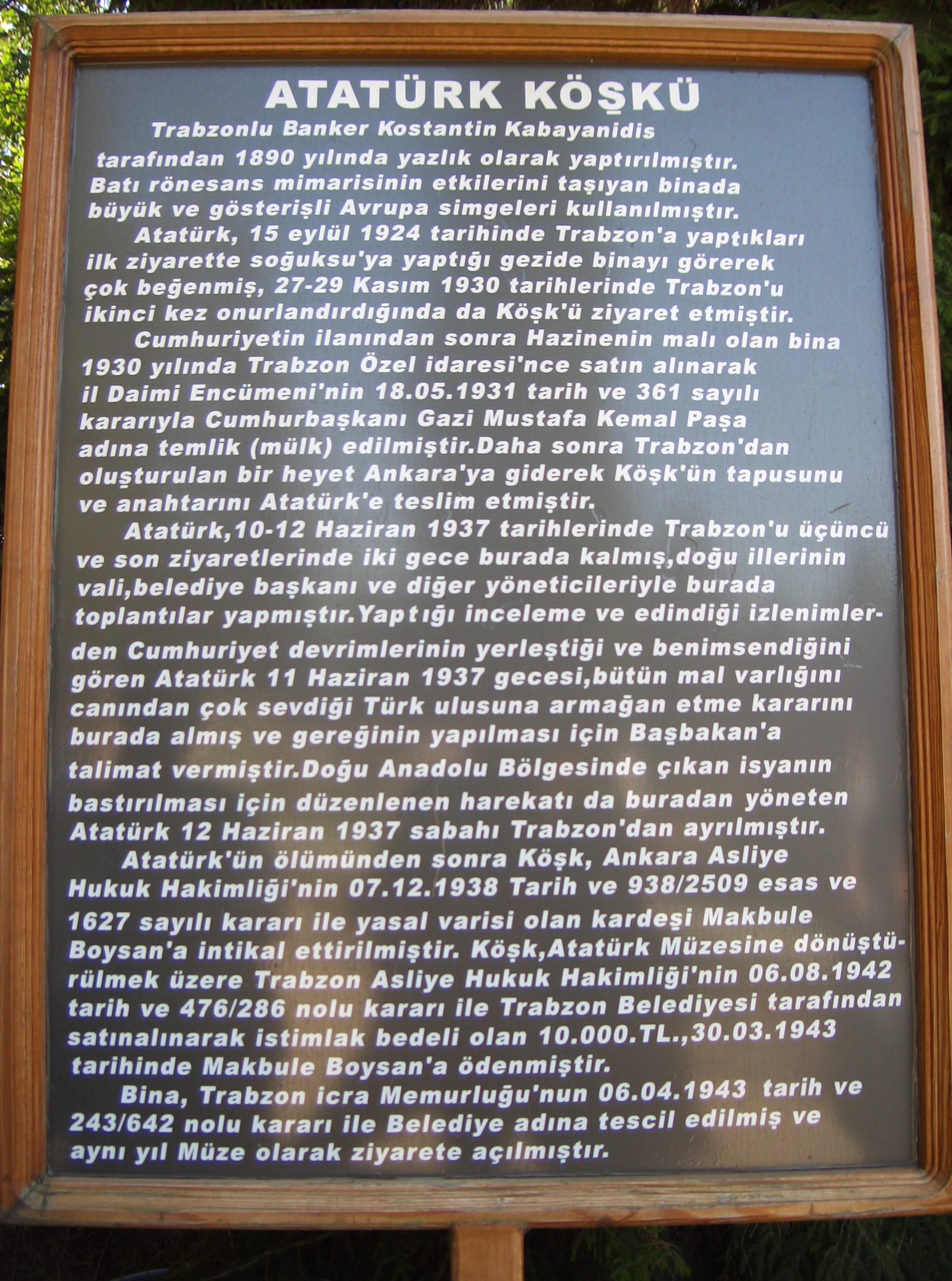 Trabzon'da Trabzon'da